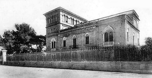 Villa Clemente, fine '800 Rosburgo (Roseto degli Abruzzi)